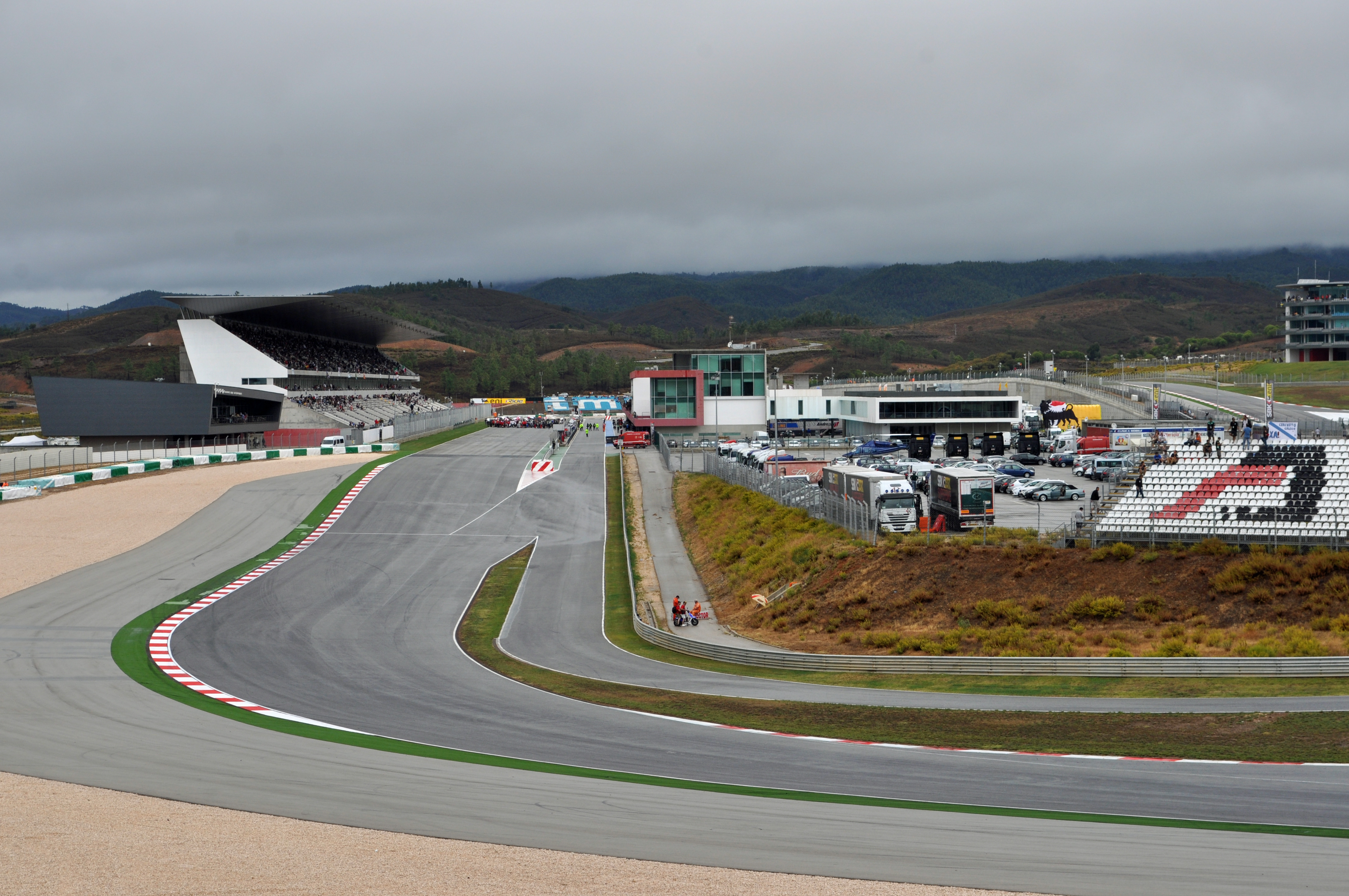 Autódromo Internacional do Algarve (2012-09-23), by Klugschnacker in Wikipedia (10) Letzte Kurve vor dem Start- und Zielbereich